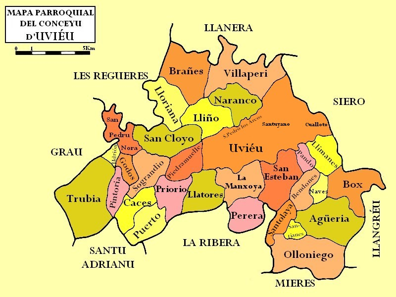 Mapa parroquial del conceyu d'Uviéu (color)